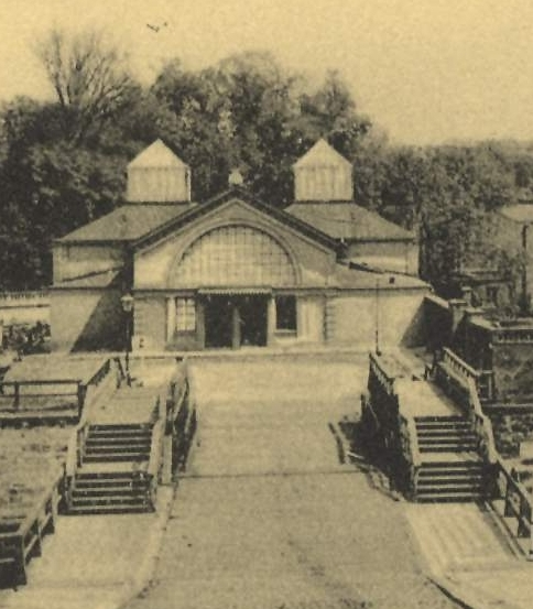 Ansicht der Kunstbaracke auf der Berliner Museumsinsel, 1885.